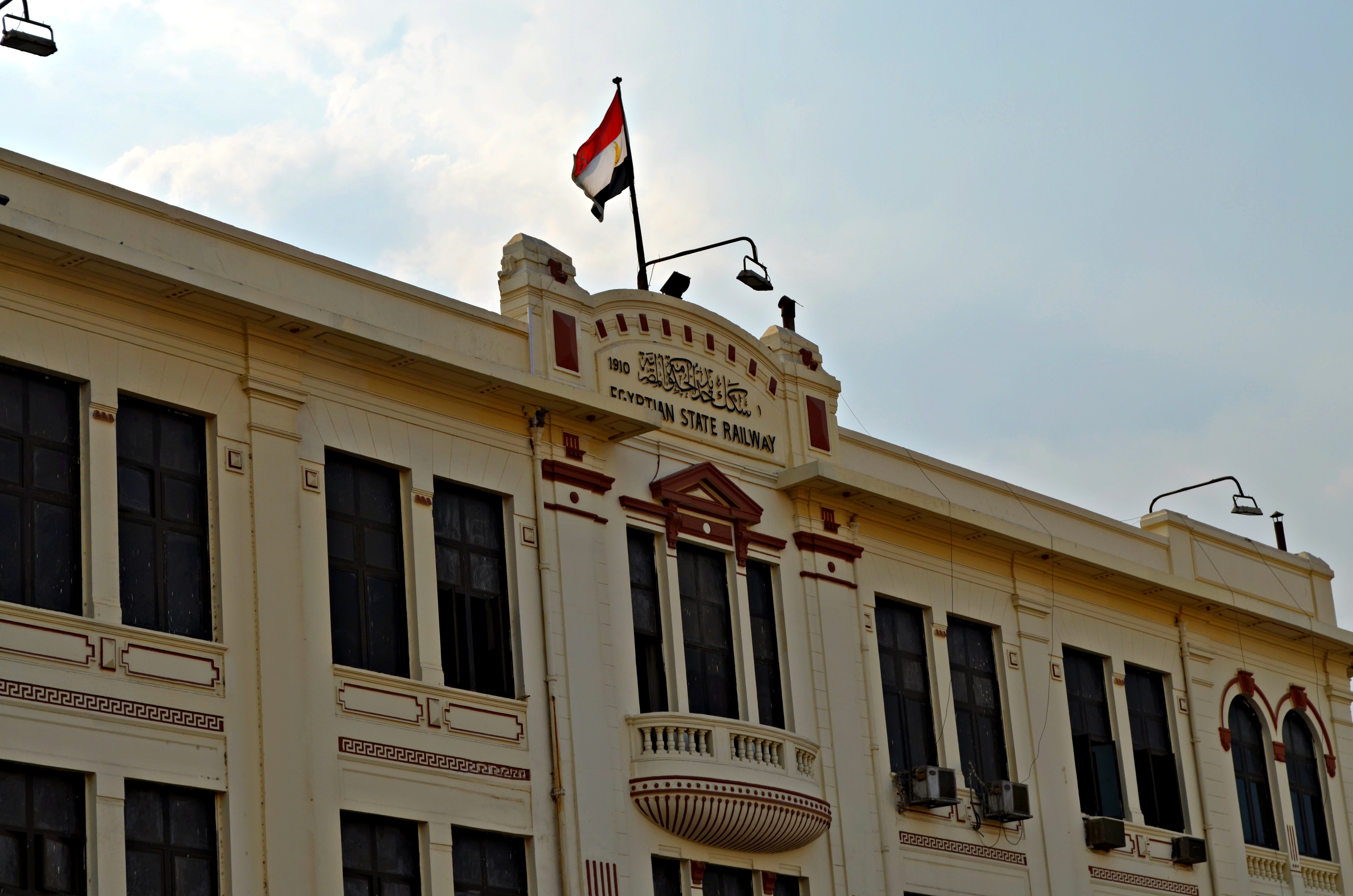 مبنى سكك حديد مصر، أو سكك حديد الحكومة المصرية كما سميت قديماً، القاهرة.